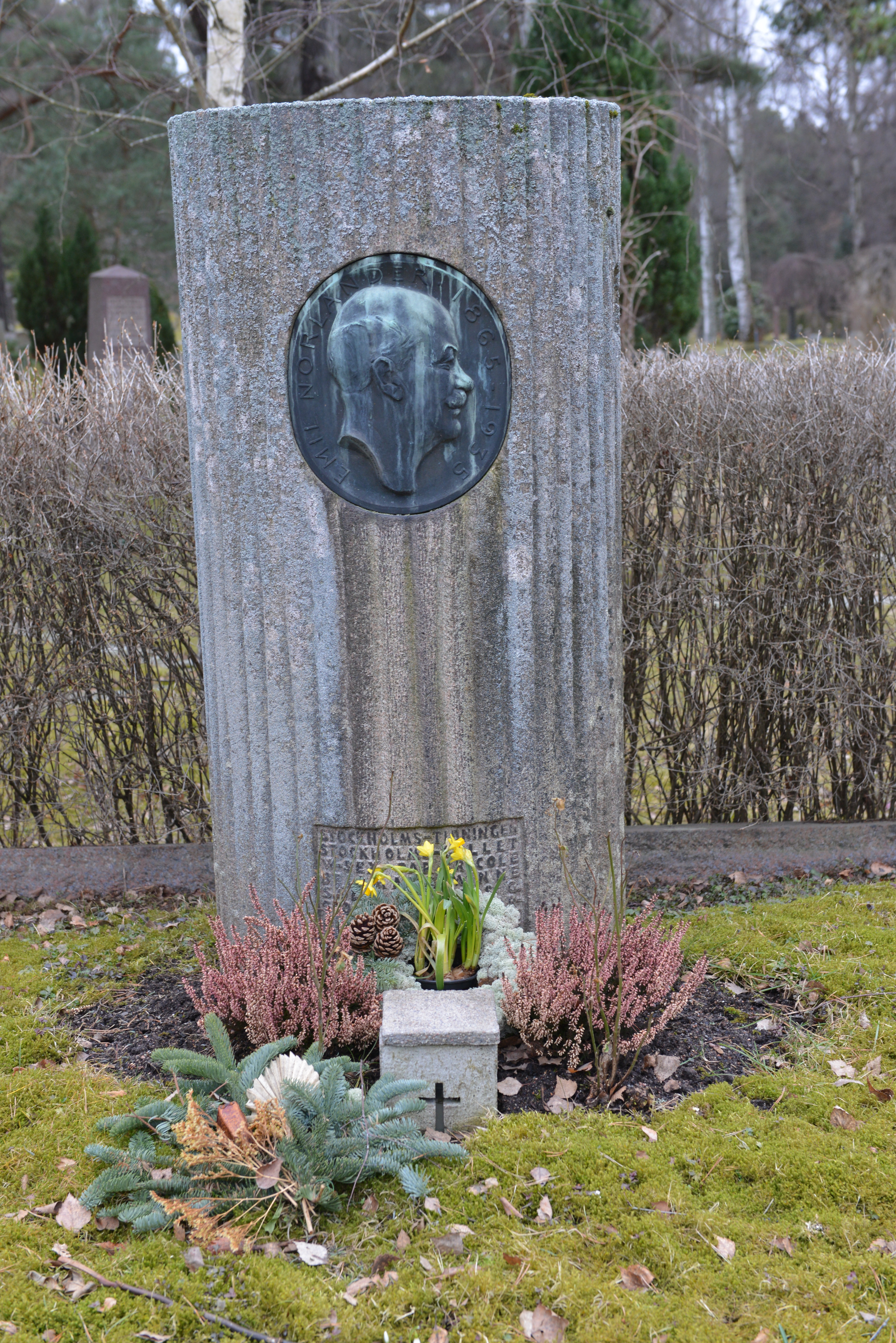 Emil Norlanders gravsten. Konstnär Svante Nilsson. Avtäcktes på kvällen den 17 maj 1940.